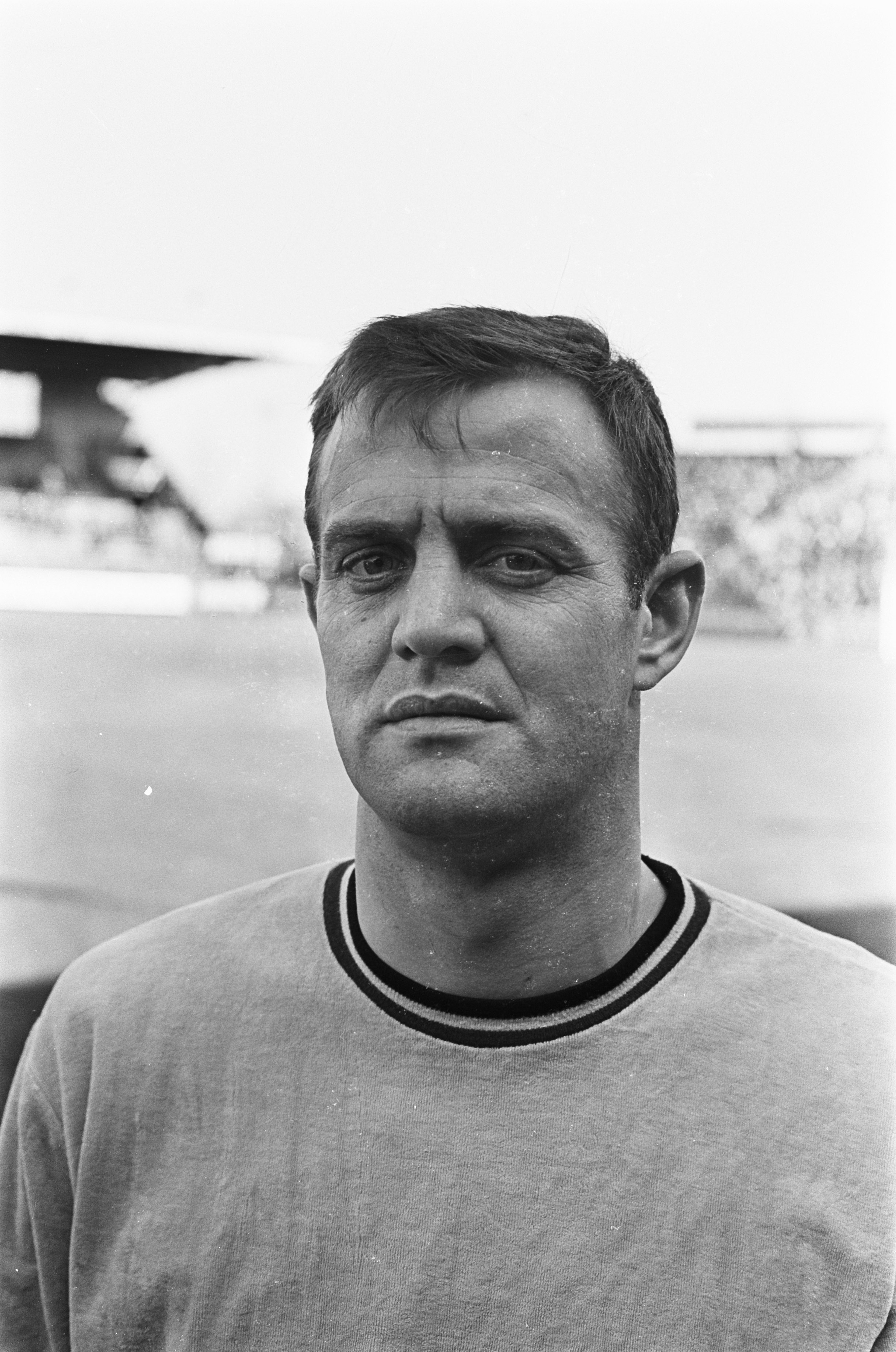 Collectie / Archief : Fotocollectie Anefo Reportage / Serie : [ onbekend ] Beschrijving : Ajax tegen Blauw-Wit 1-0. Gert Bals Datum : 24 maart 1968 Trefwoorden : sport, voetbal Persoonsnaam : Bals, Gert Instellingsnaam : AJAX Fotograaf : Kroon, Ron / Anefo Auteursrechthebbende : Nationaal Archief Materiaalsoort : Negatief (zwart/wit) Nummer archiefinventaris : bekijk toegang 2.24.01.05 Bestanddeelnummer : 921-1896